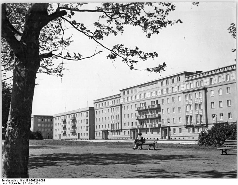 Berlin, Ostseestraße, Wohnblocks Zentralbild Schwadten 1 Motiv 1.6.1955 Das neue Berlin Neue Wohnblocks in der Ostseestrasse, Berlin-Prenzlauer Berg. (Aufgenommen am 31.5.1955)